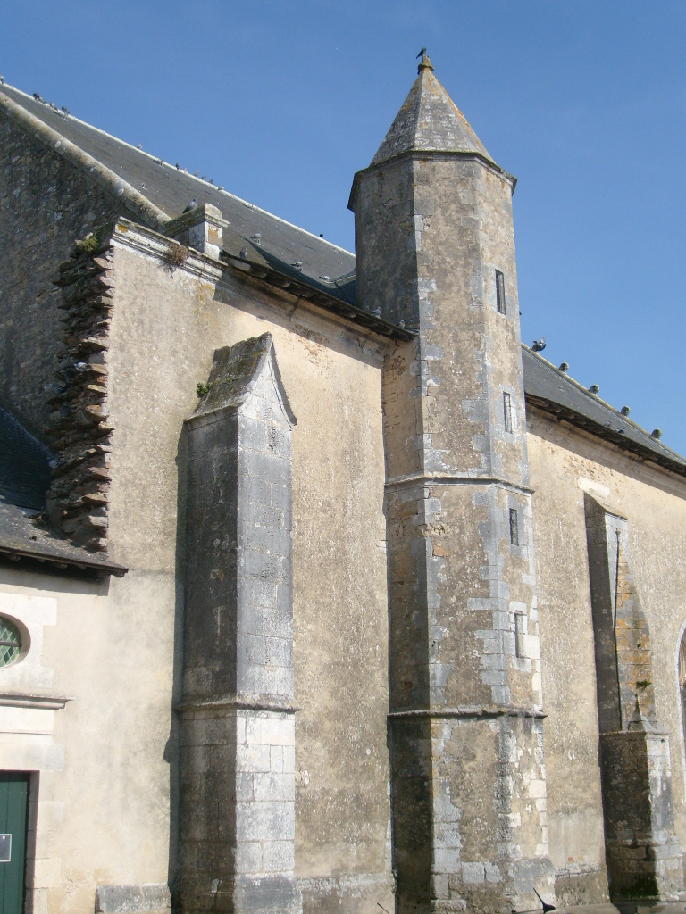 "Tour des sarments" de l'église Notre-Dame d'Olonne-sur-mer.